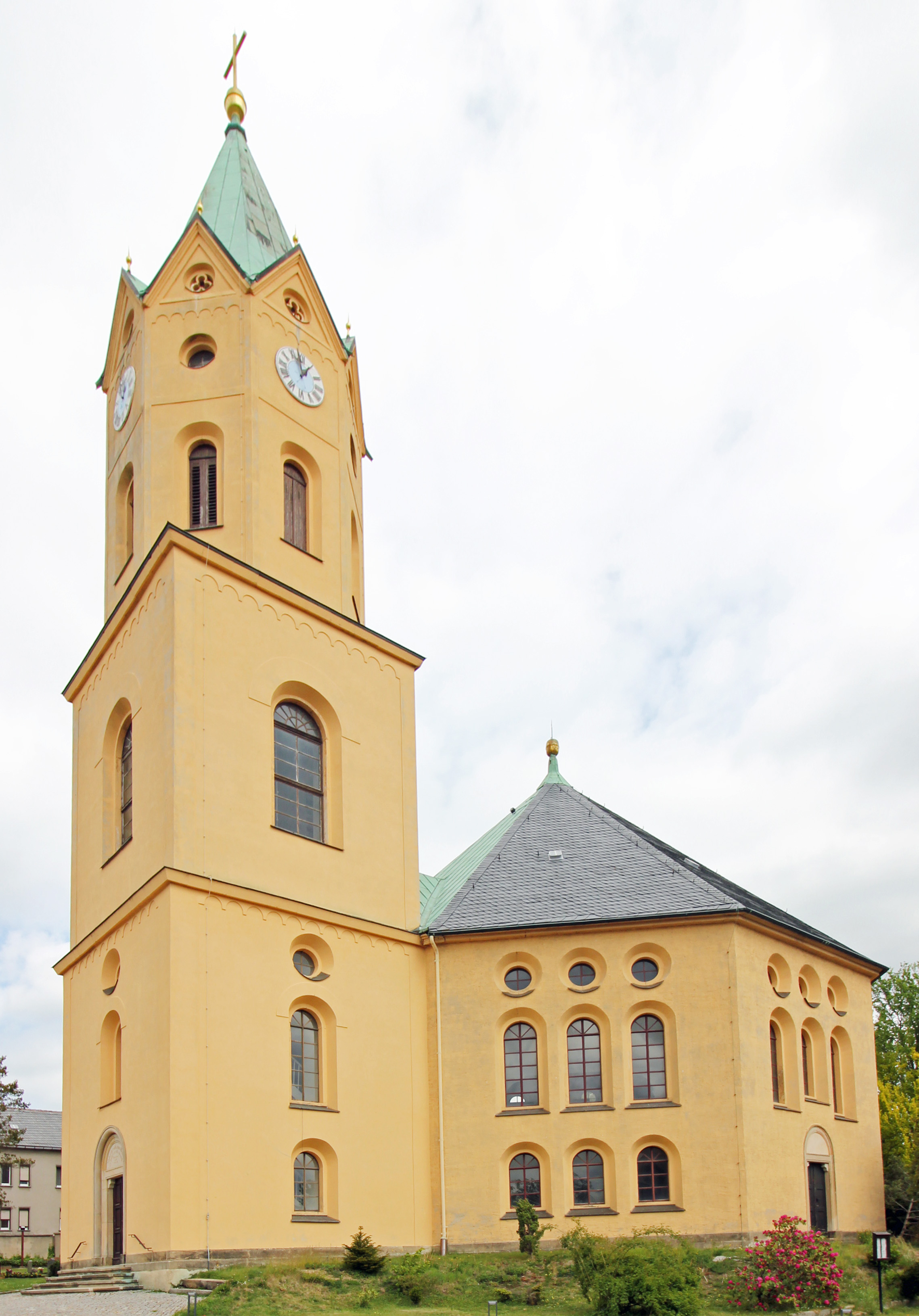 Hornjoserbsce: Ewangelska cyrkej w Lichtenbergu